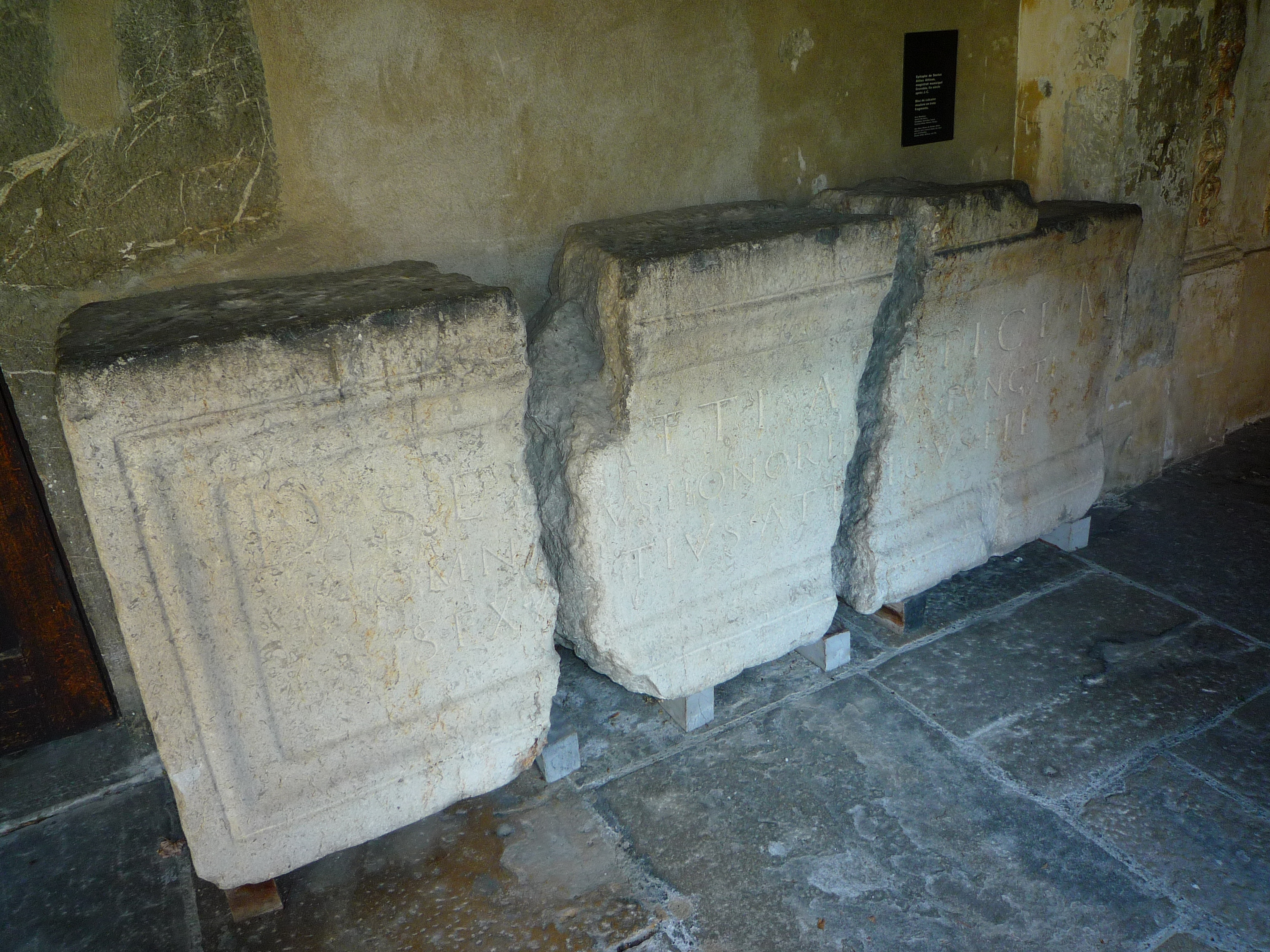 Epitaphe de Sextus Attius Atticus, magistrat municipal de Cularo (Grenoble) au IIe siècle. Bloc de calcaire mouluré en 3 fragments : D(is) M(anibus) / Sex(ti) Atti Attici / omn[b]us honoribus functi / Sex(tus) A[t]tius Atticus, fil(ius). : Aux dieux Mânes de Sextus Attius Atticus, qui a exercé toutes les charges municipales, Sextus, Attius Atticus, son fils.